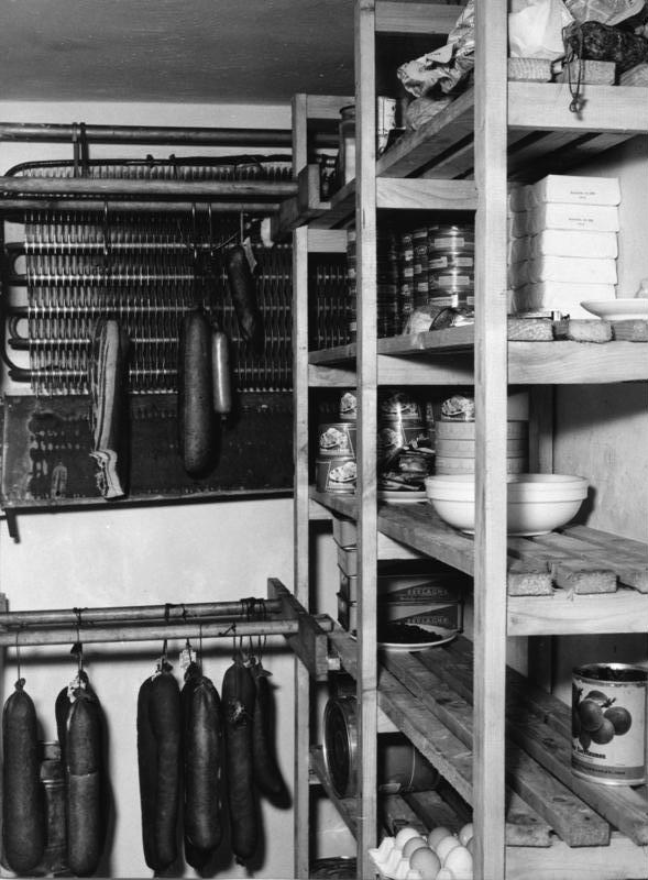 Carritas Heimstatt Kath. Stinnes Gladbeck - Brauk Hartmannshof 6 Kühlanlage